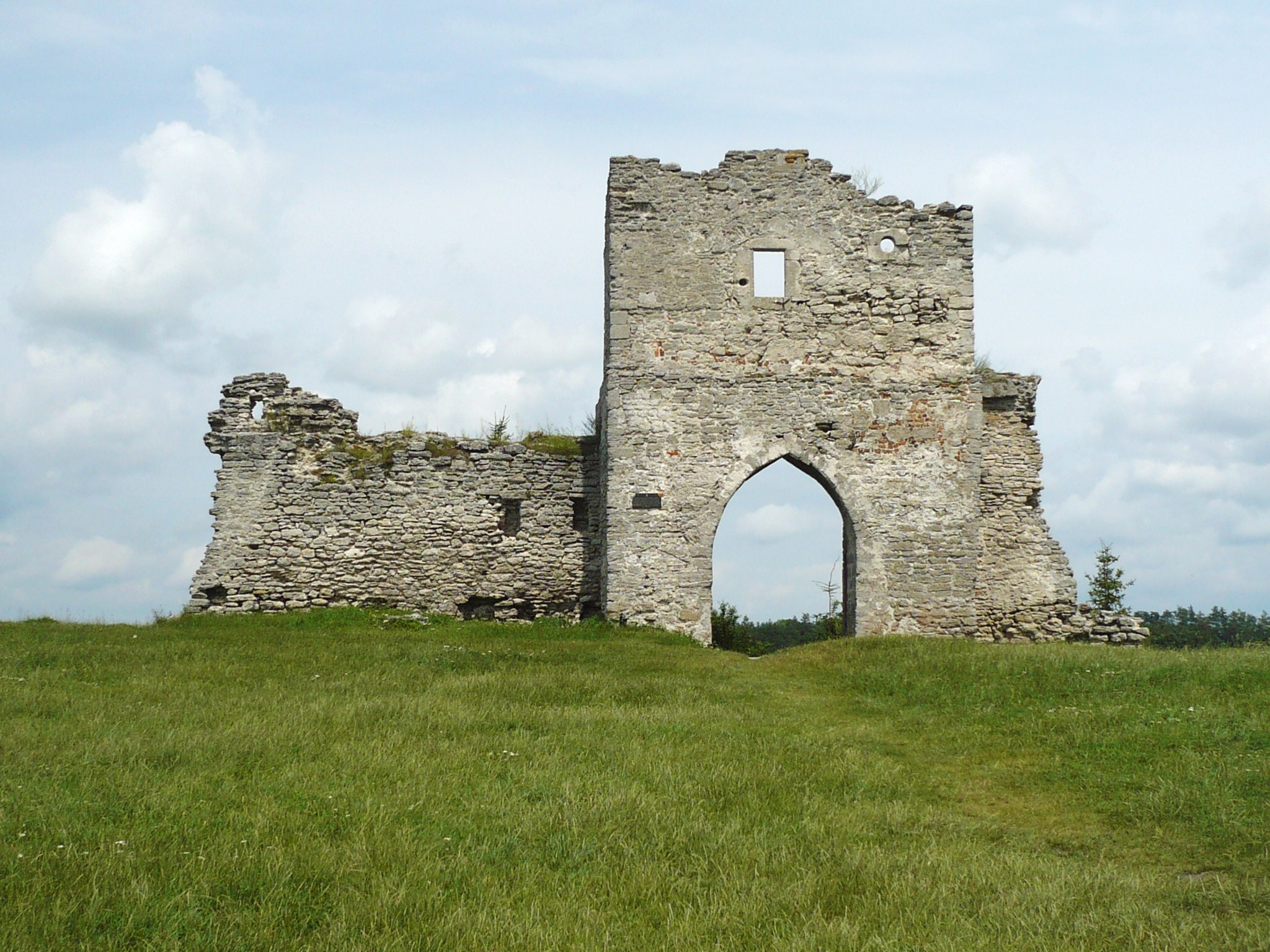 Zamek w Krzemieńcu